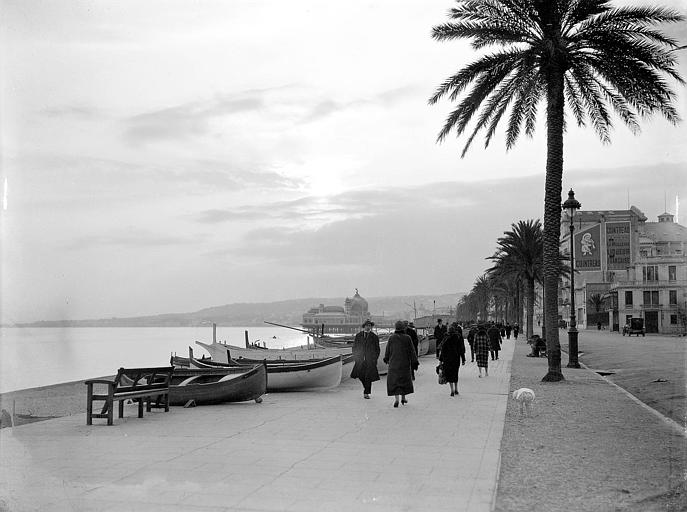 Coucher de soleil sur la Promenade des Anglais, Georges-Louis Arlaud. Photo prise à Nice vers 1925